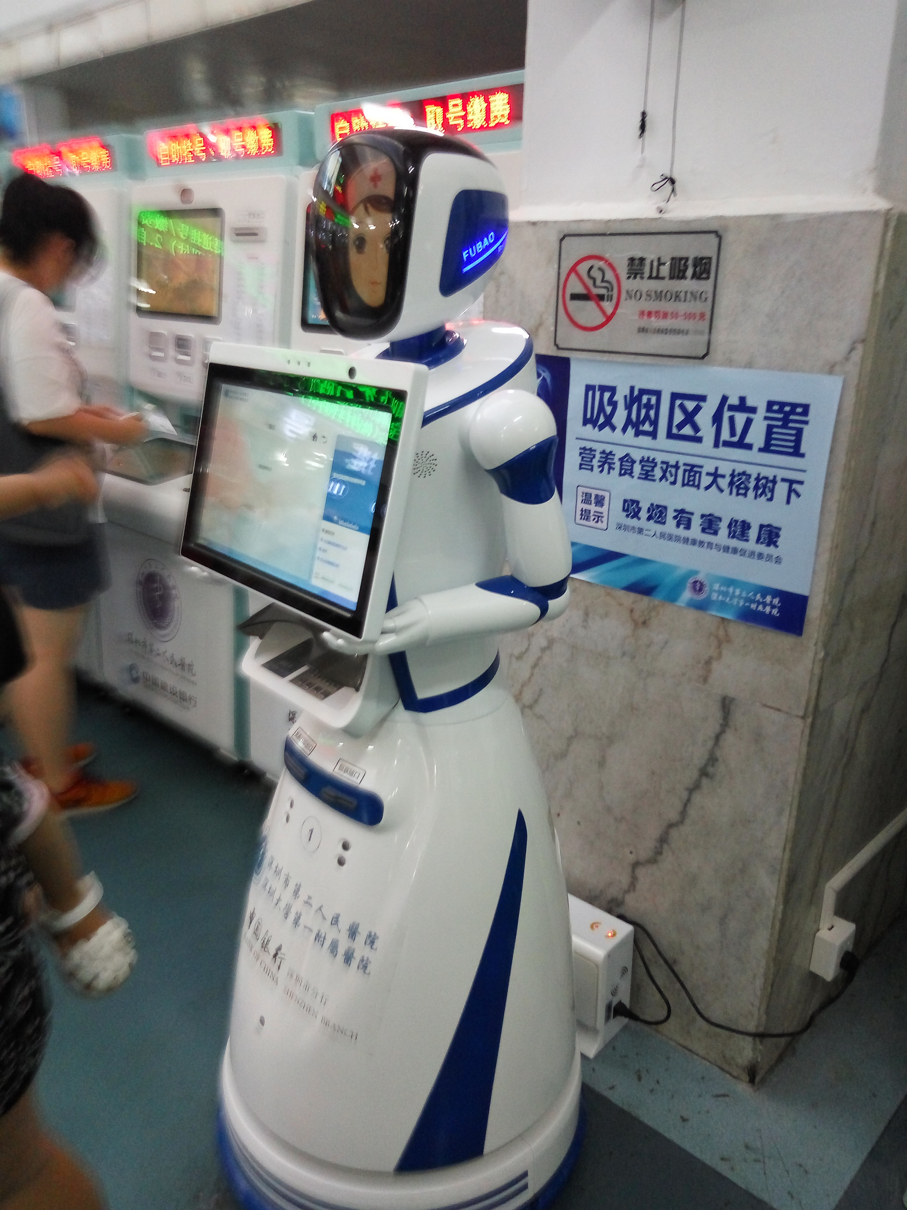 在深圳市第二人民医院服务的智能导医机器人